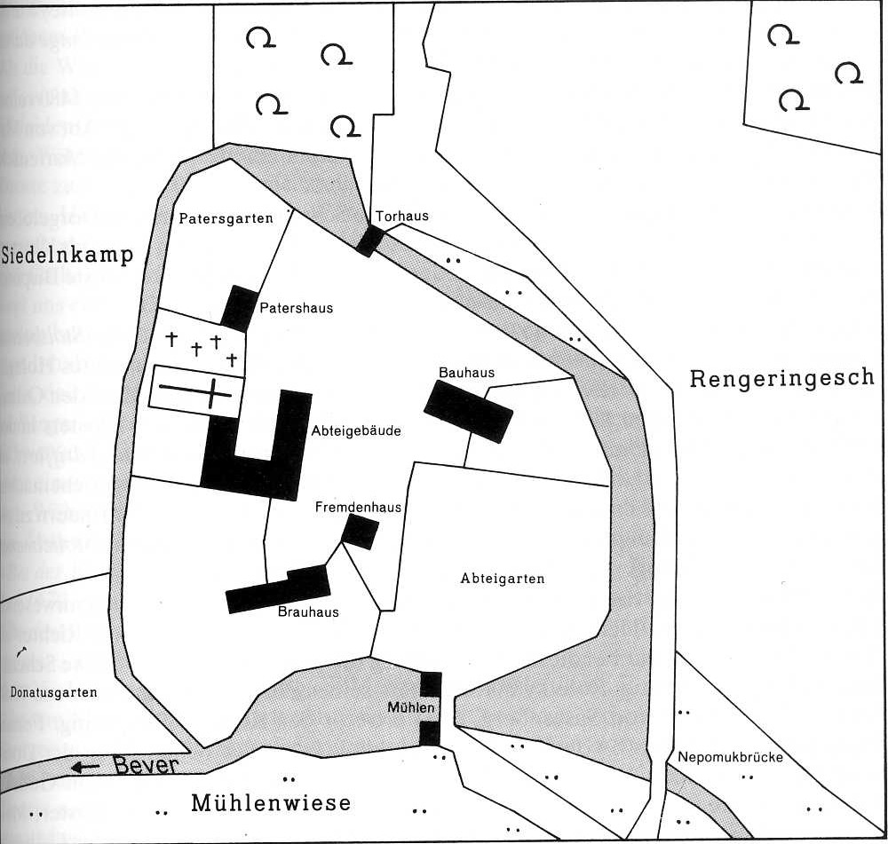 Lageplan von Regering